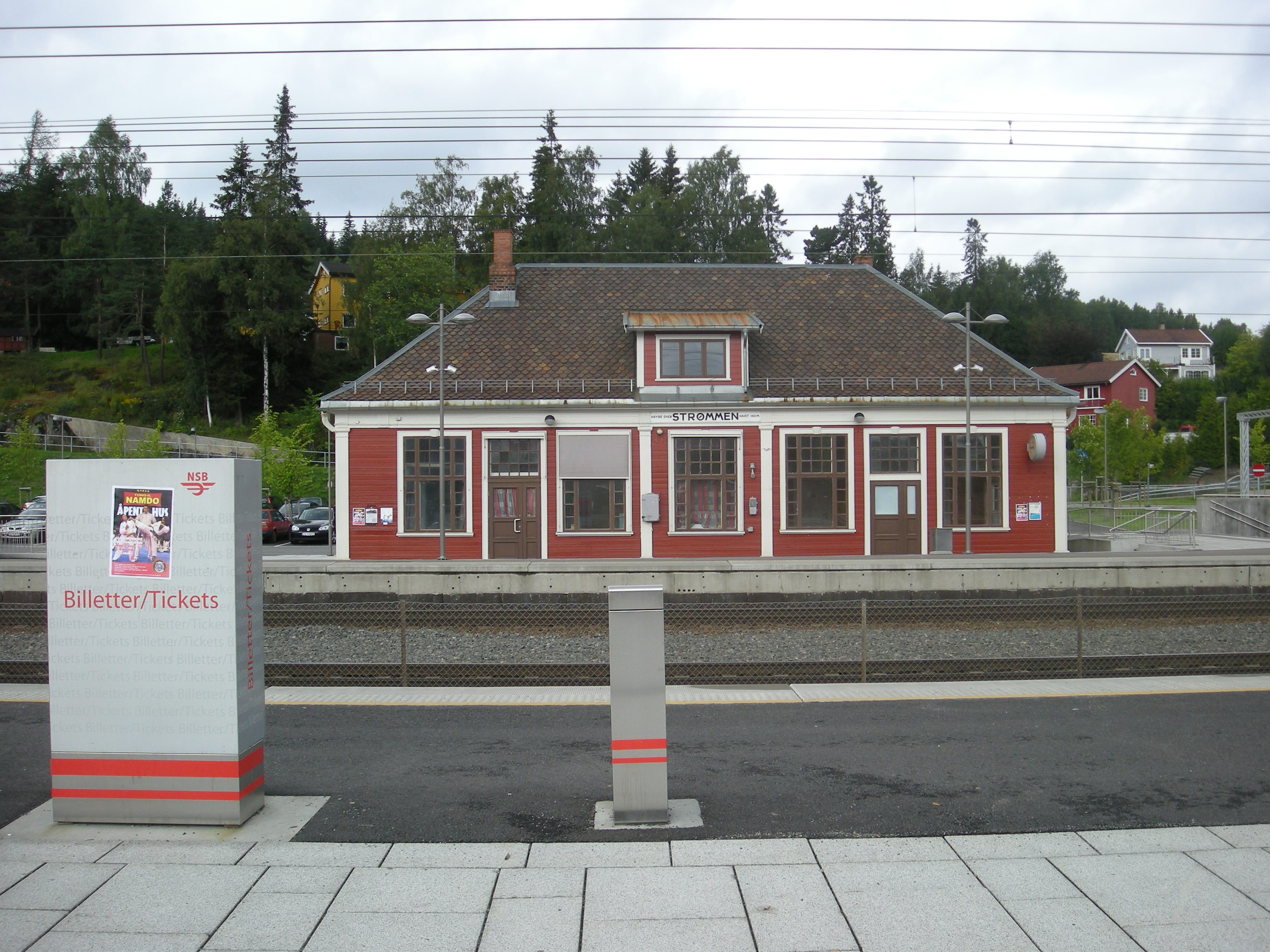 Strømmen stasjon